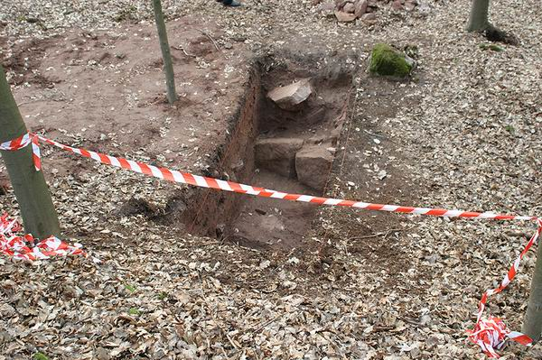 Römerlager - Eine der Grabungsstellen im Sudholz